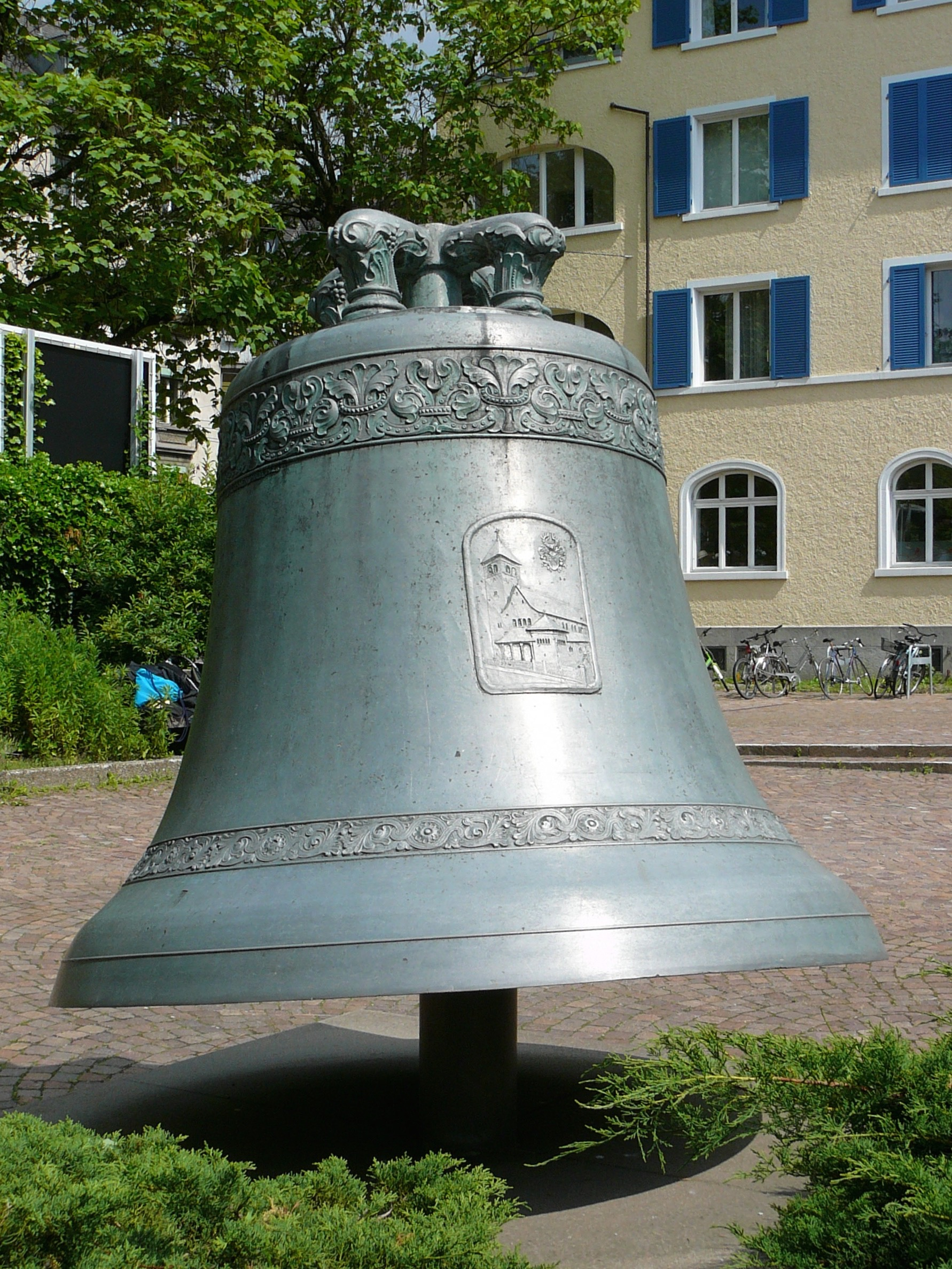 Römisch-katholische Kirche Herz Jesu Zürich-Wiedikon Glocke